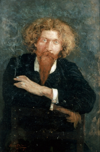 O notável anarquista francês Zo d'Axa em 1891. Quadro pintado por Constant Montald.